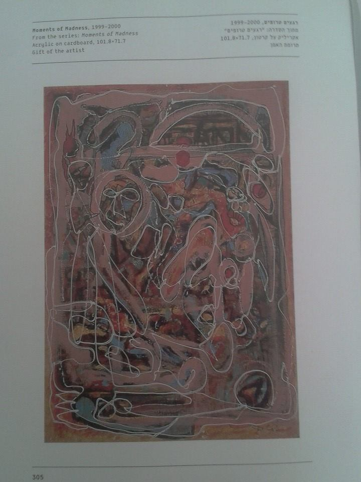 ציורו של משה סחר המוצג ביד ושם